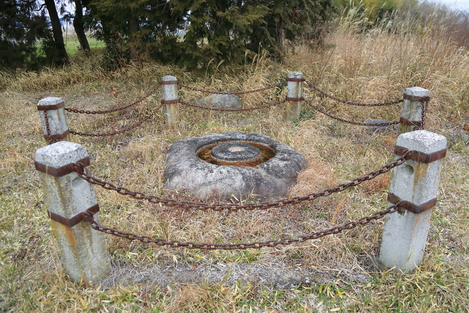 舞木廃寺塔跡（豊田市舞木町、2019年（平成31年）2月）